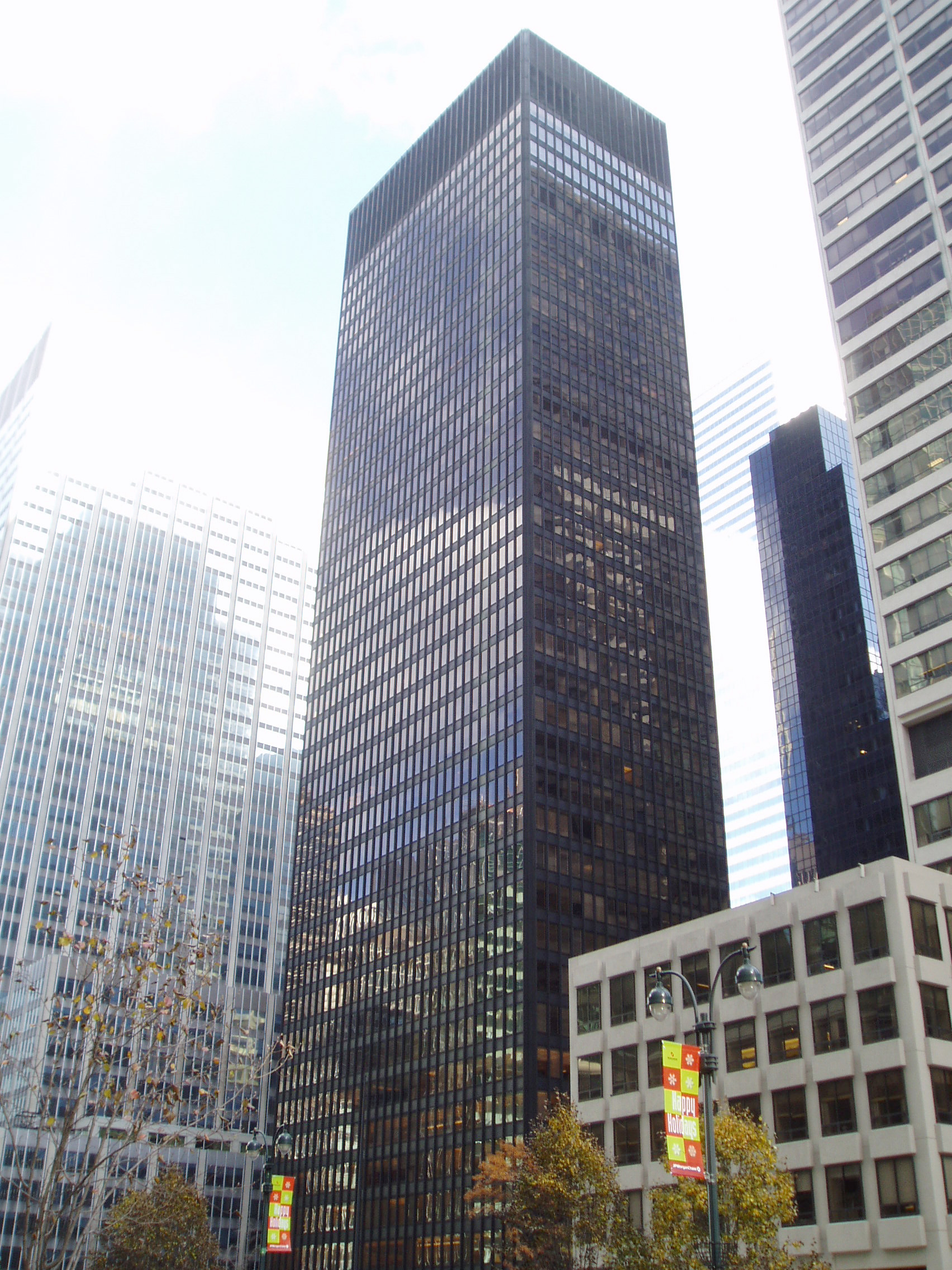 Seegram Building